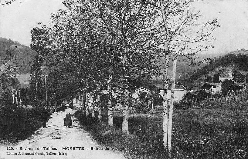 environs de Tullins. Morette (Isère). Entrée du village. Carte postale ancienne.